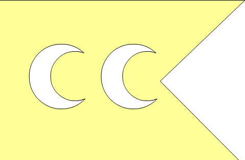 Military flag of Silahtar Unit (Ottoman Empire). Turkish: Silahtar Bölüğü Sancağı. Latvian: Kājinieku vienības karogs.